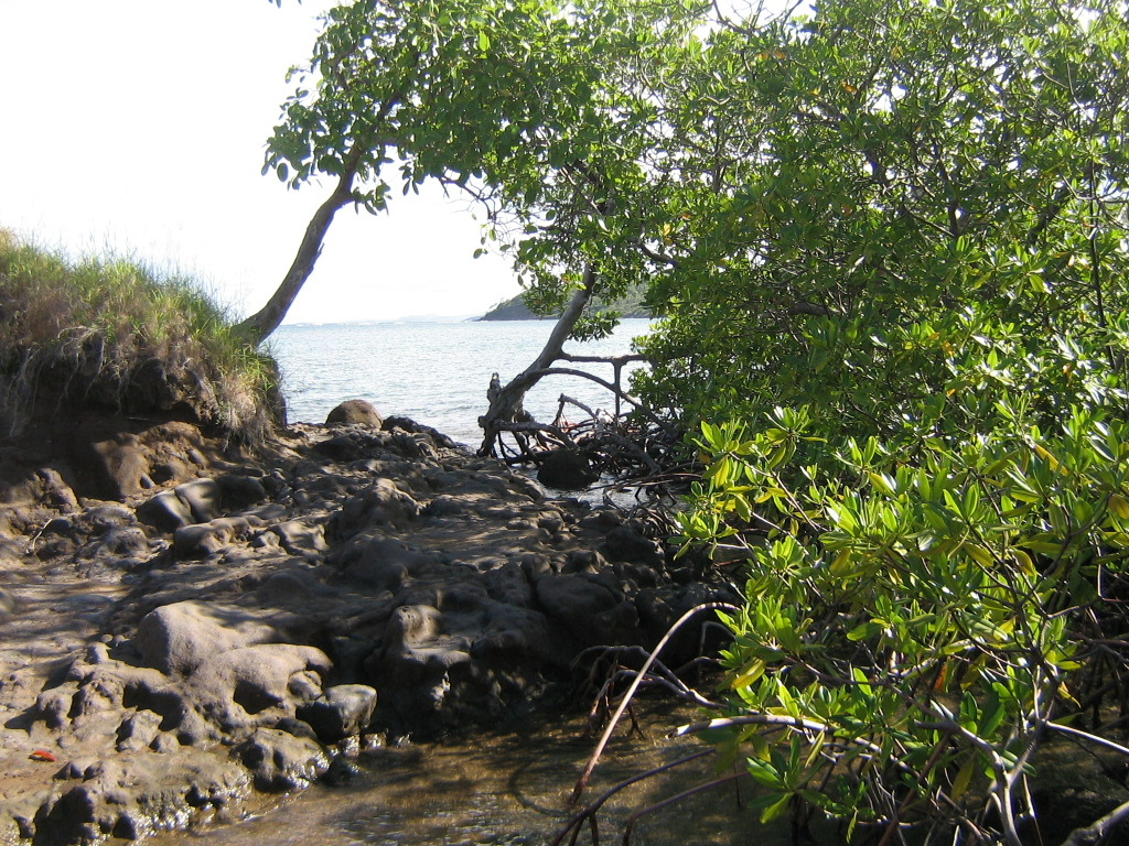 Aspect de la mangrove non loin du château Dubuc.